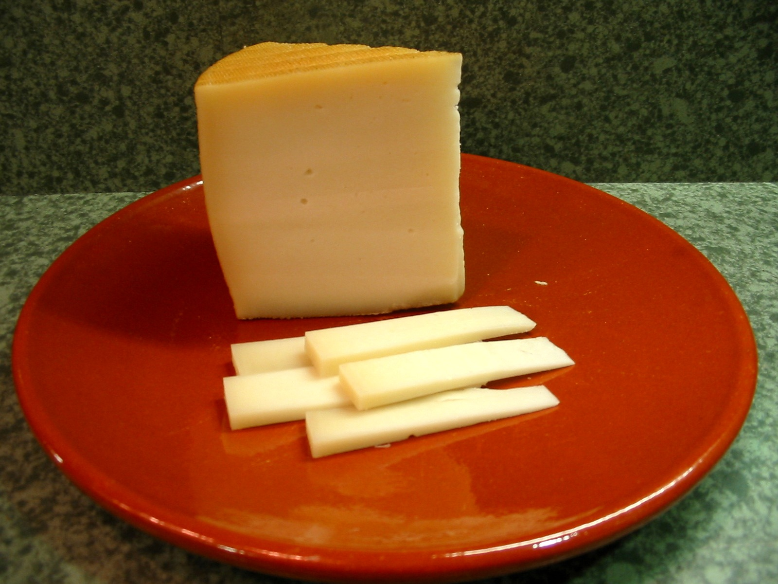 Cuña de queso Idiazábal